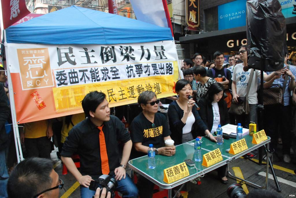 香港泛民主派組織舉辦街頭論壇，探討佔領中環等民主運動議題。